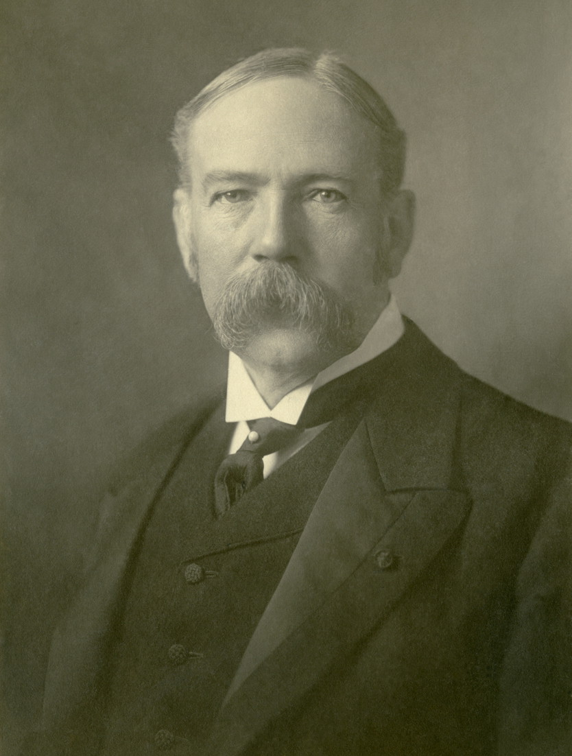 Carl Gustav Thulin (1845-1918), skeppsredare